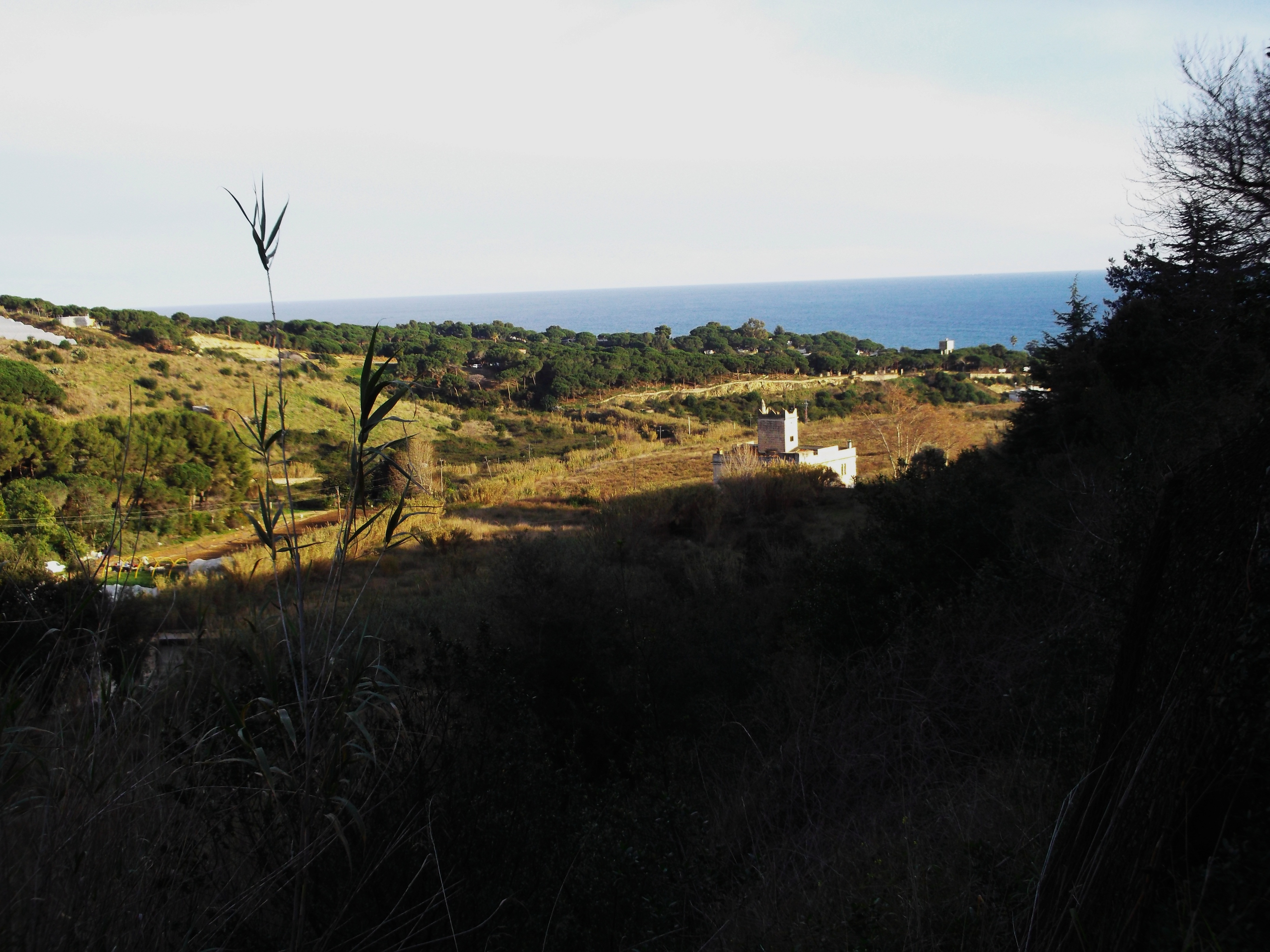 El Rial del Oms i Segarrès.